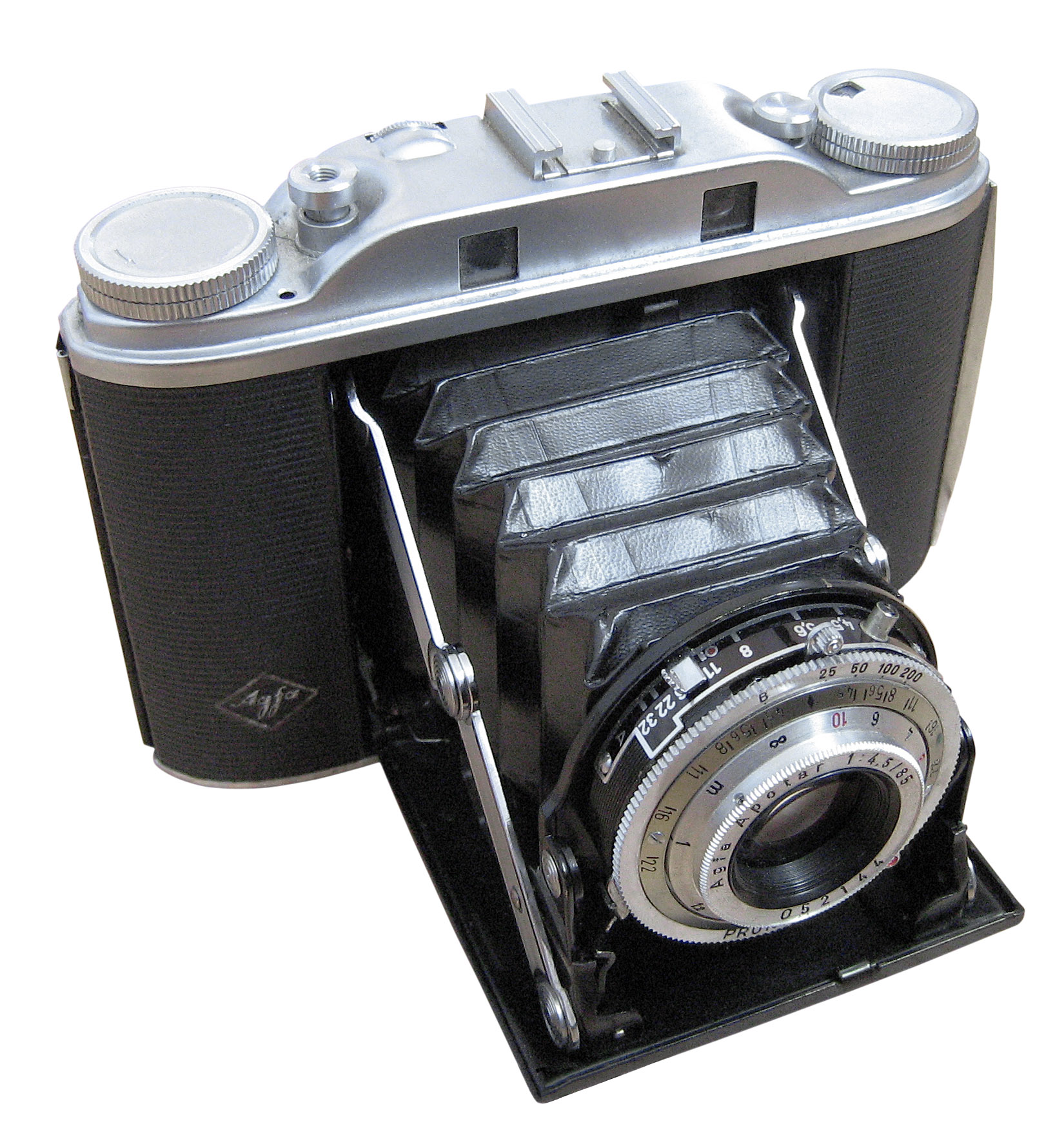 Agfa Isolette III Kamera/camera, 1960er/1960s